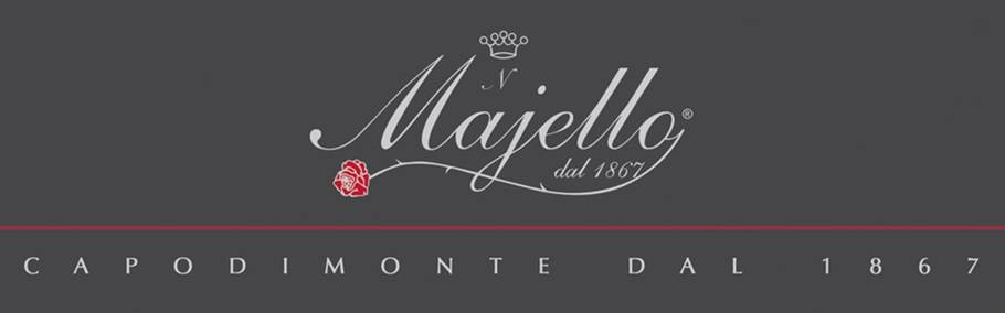 logo artisti Majello